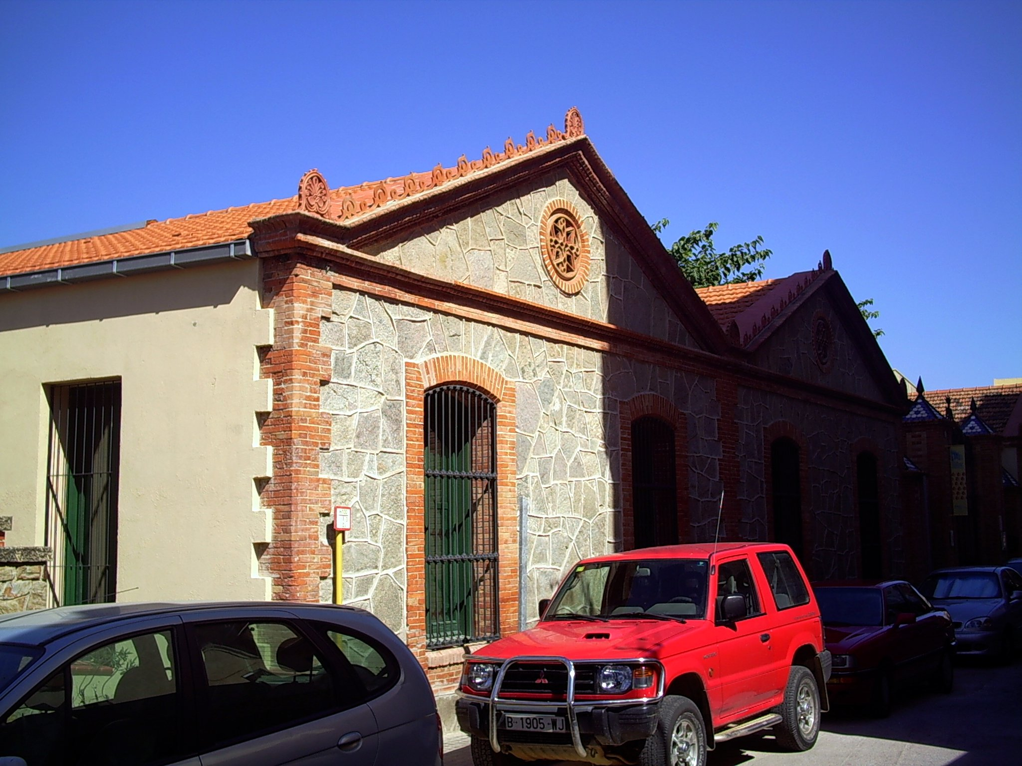 Antiga fàbrica del gas, a Premià de Mar, comarca del Maresme, (Catalunya). Seu del Museu de l'Estampació Tèxtil. És l'única fàbrica de gas d'hulla que resta d'empeus, a Catalunya, i ha estat rehabilitada recentment per acollir el Museu, per l'arquitecte Rafael de Cáceres.